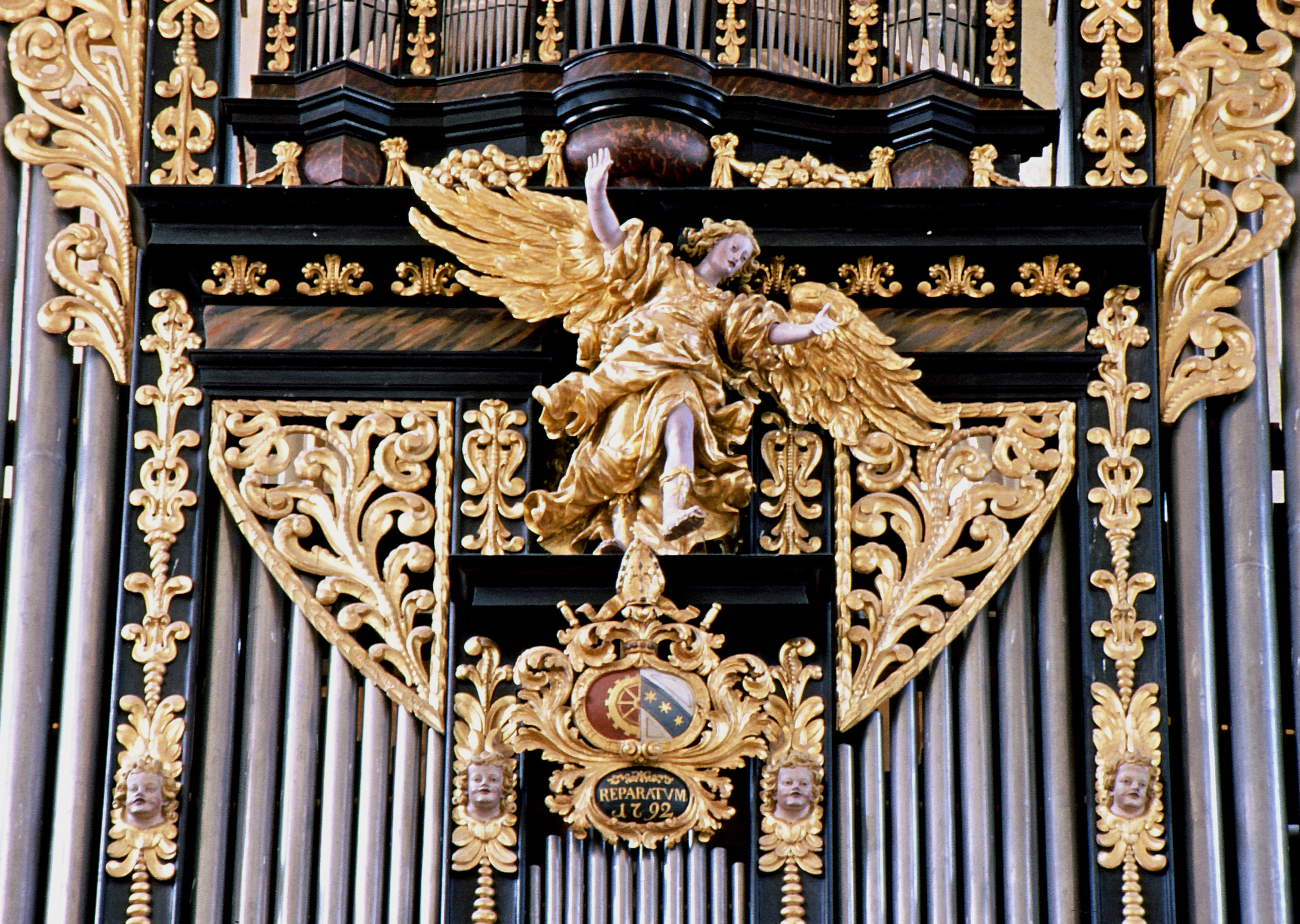 Engel am Orgelprospekt in der Klosterkirche von Kaisheim von Andreas Thamasch, 1682